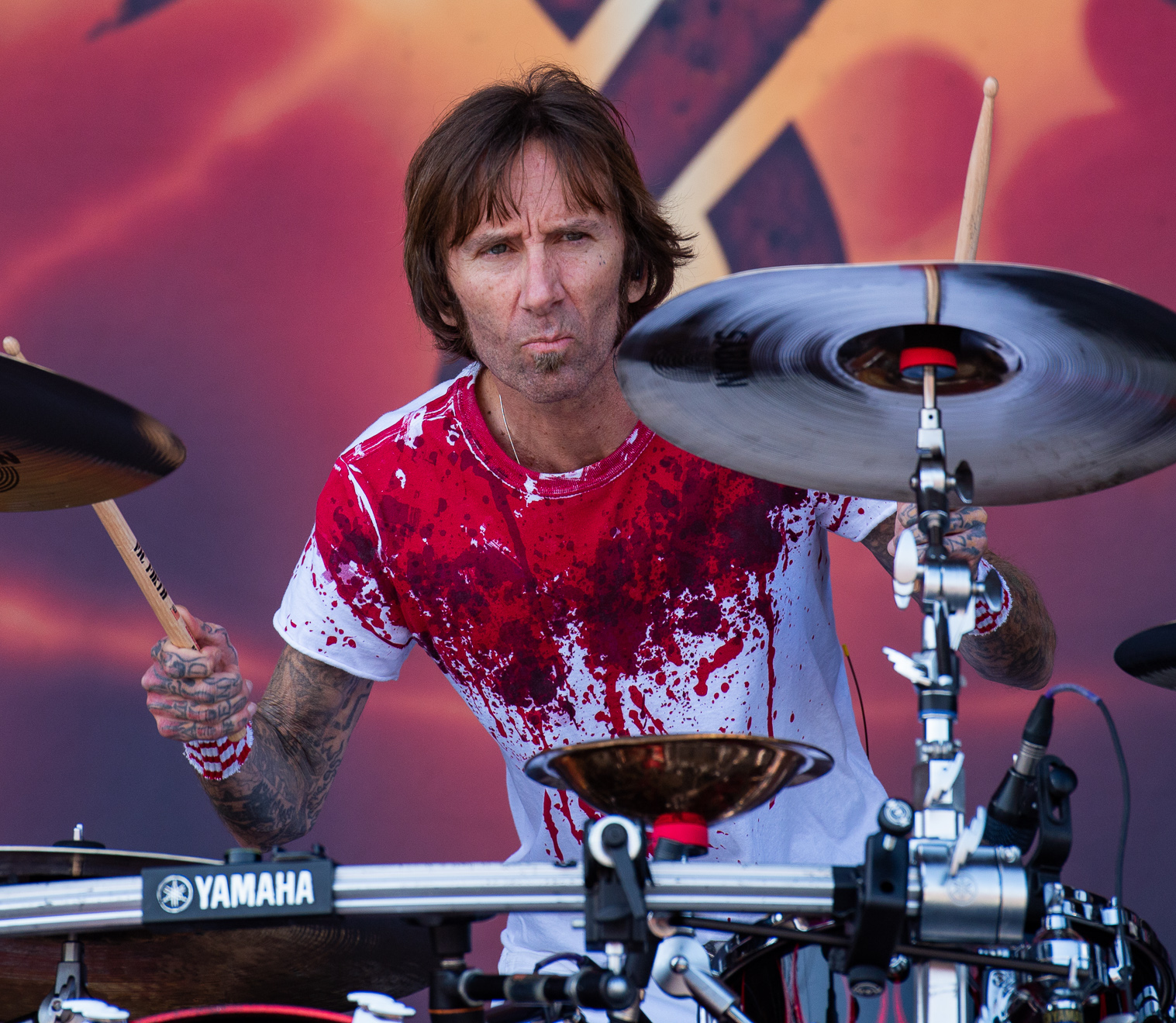 ARGO-Konzerte,Godsmack,Konzert,Livekonzert,Livemusik,Musik,RiP,Rock im Park 2019,Shannon Larkin,Zeppelin Stage